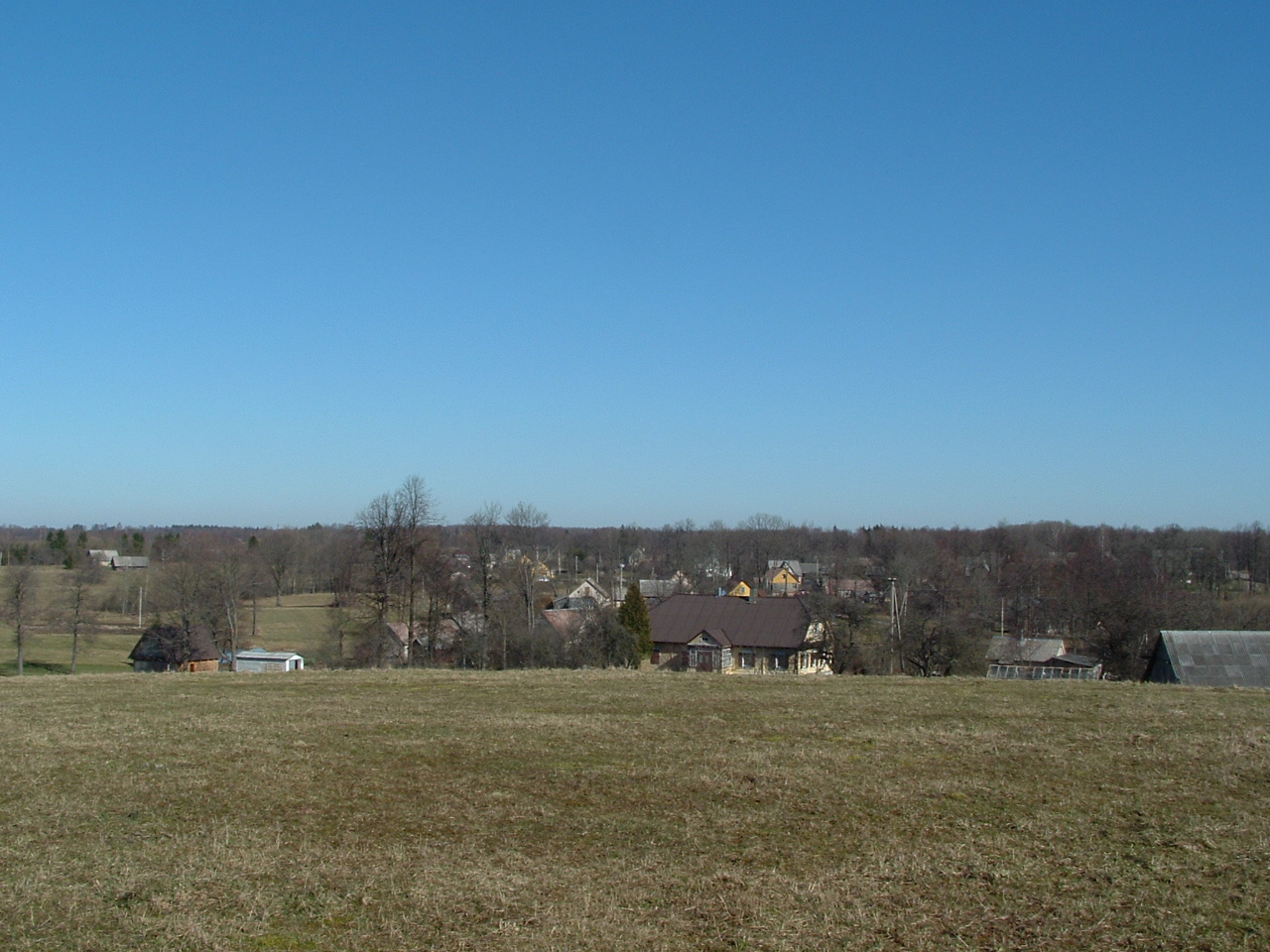 Ažugirių kaimas